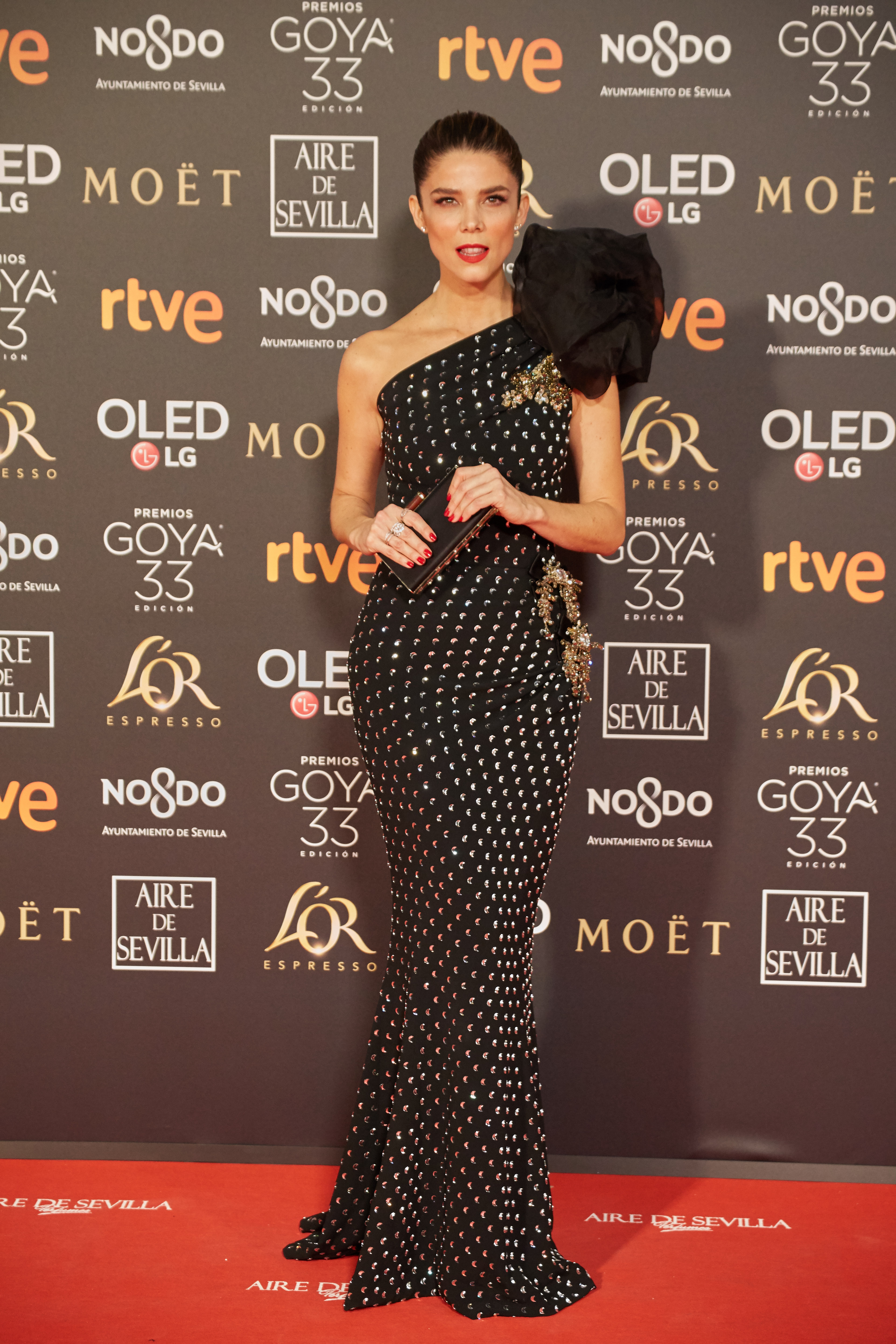 Juana Acosta en la alfombra roja de los Premios Goya celebrados en Sevilla en Febrero 2019